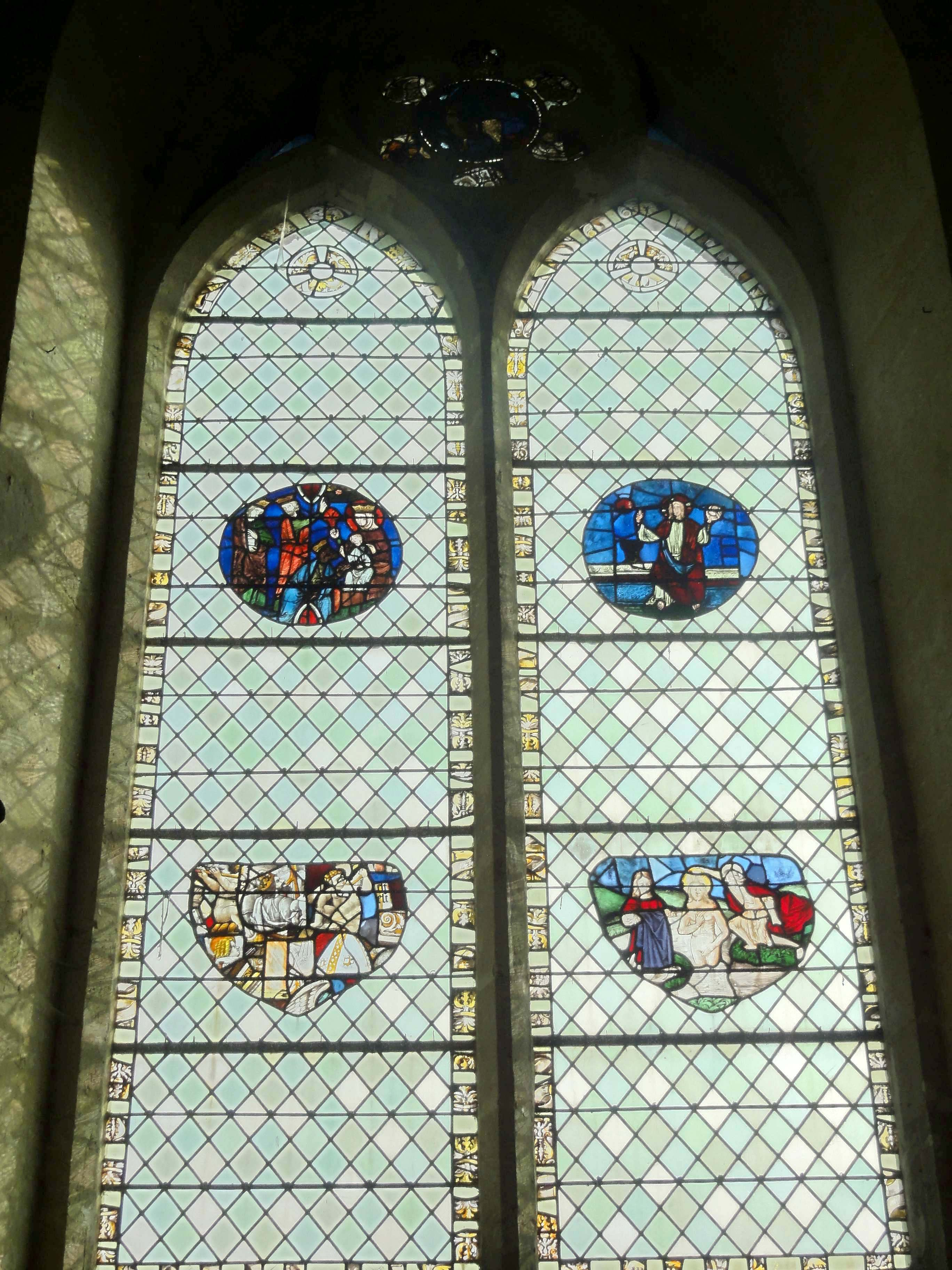 Verrière d'axe du chevet (n° 0) - voir titre.